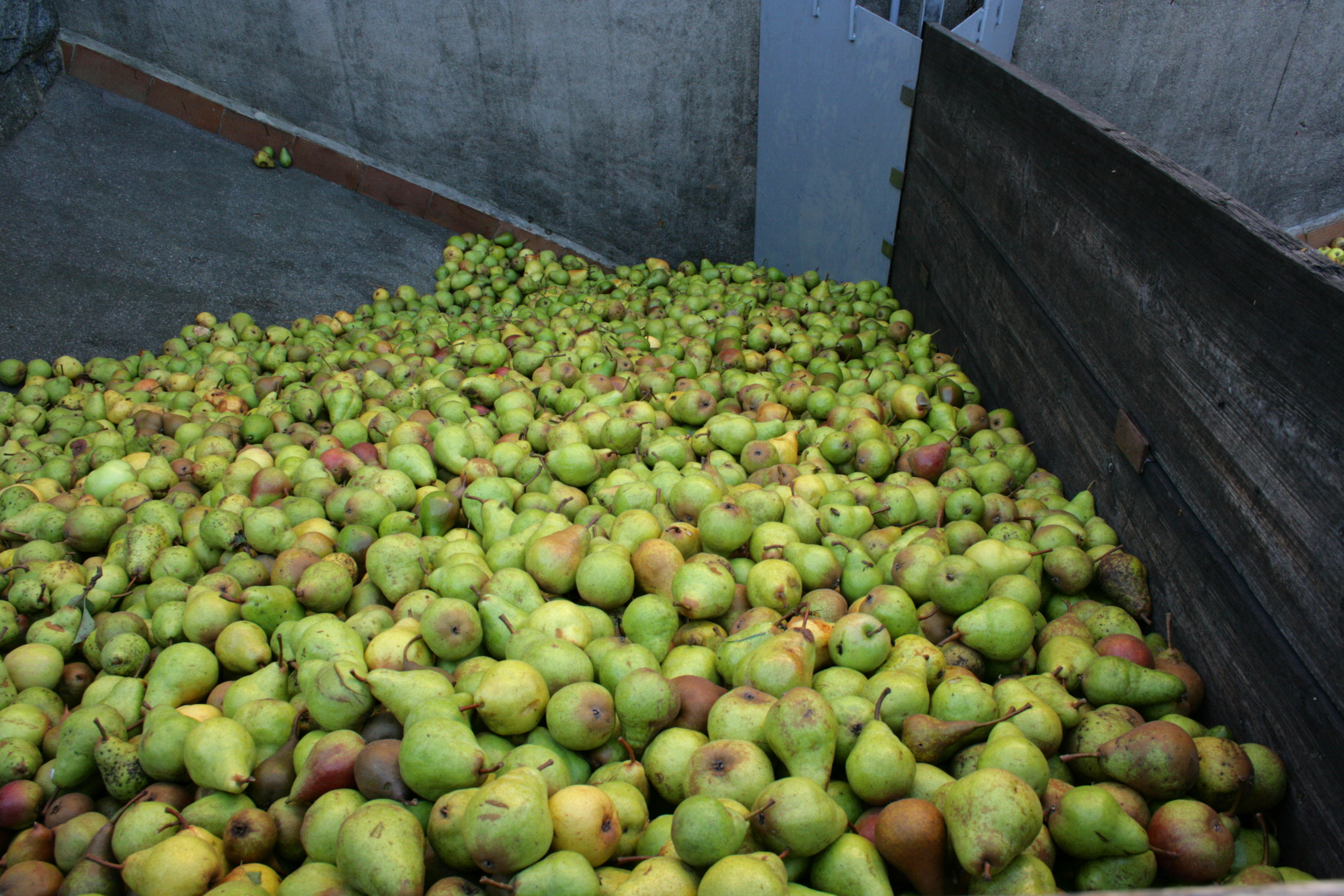 Kelterei Dressler, Denkwitz in Großpostwitz